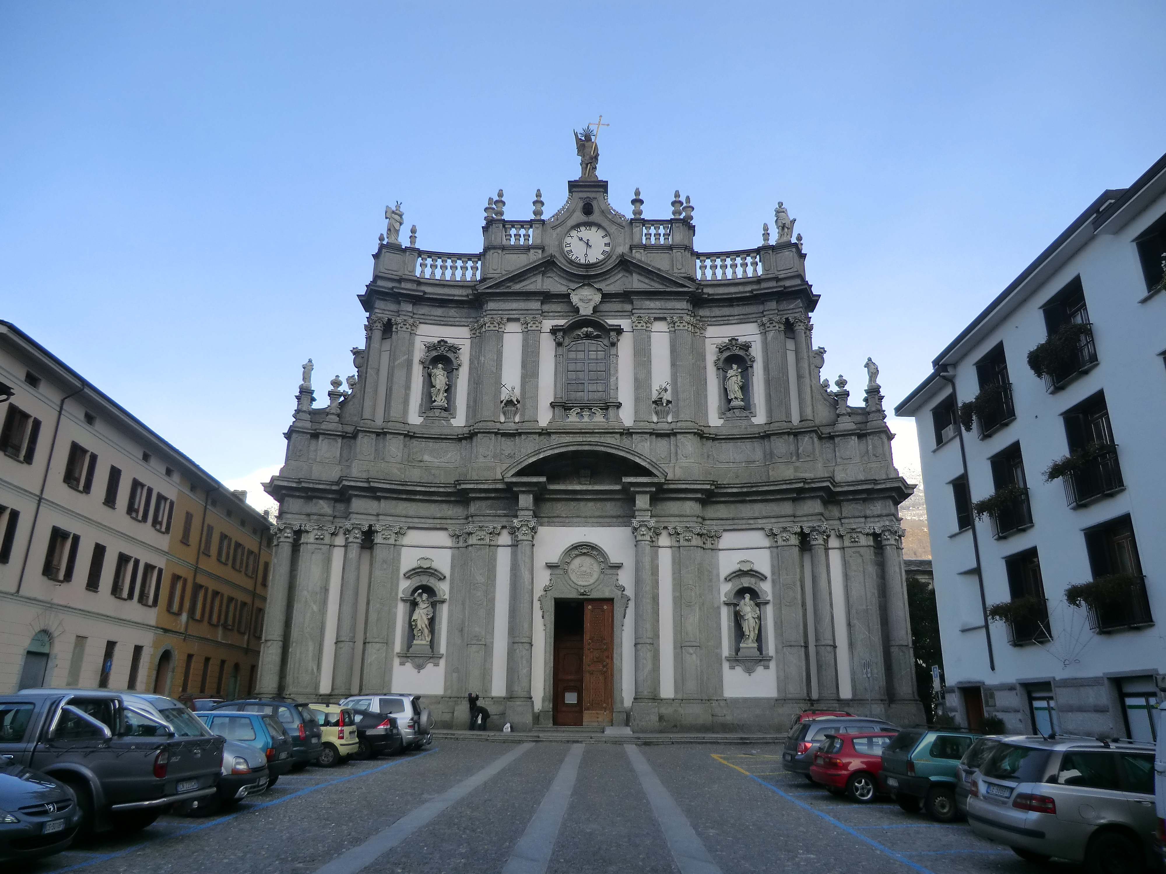 Morbegno. Facciata della Collegiata di San Giovanni Battista